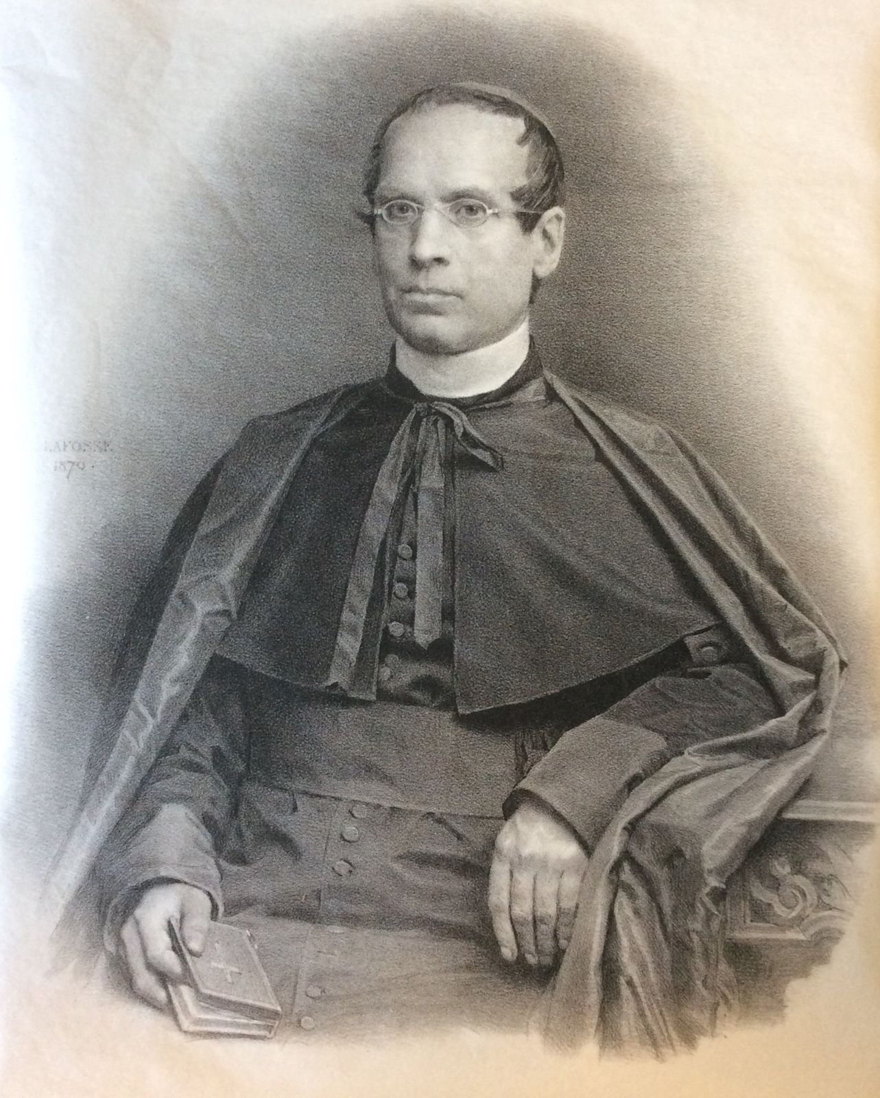 Lithographie du cardinal Pitra (1812-1889) en 1871.